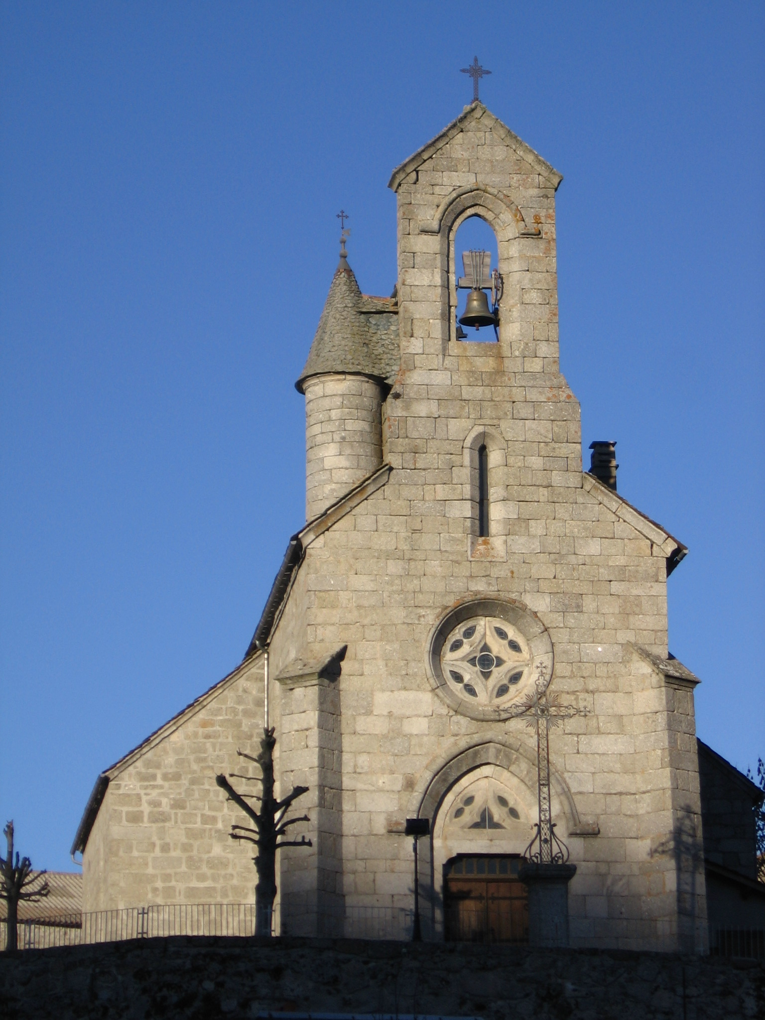 Photo de l'Eglise du Buisson, prise en décembre 2006 du sud du village.